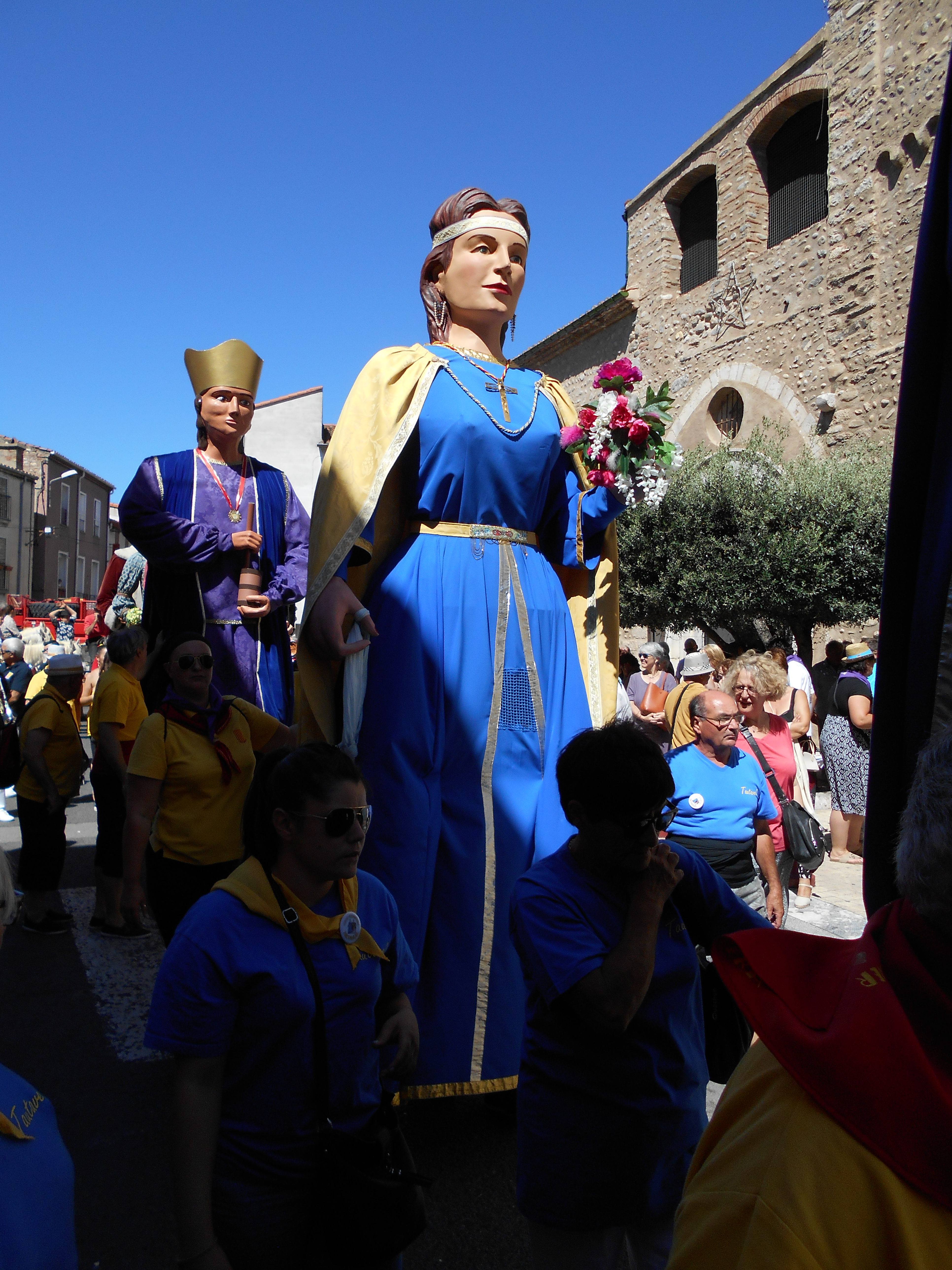 Toda de Barcelona, geganta de Talteüll